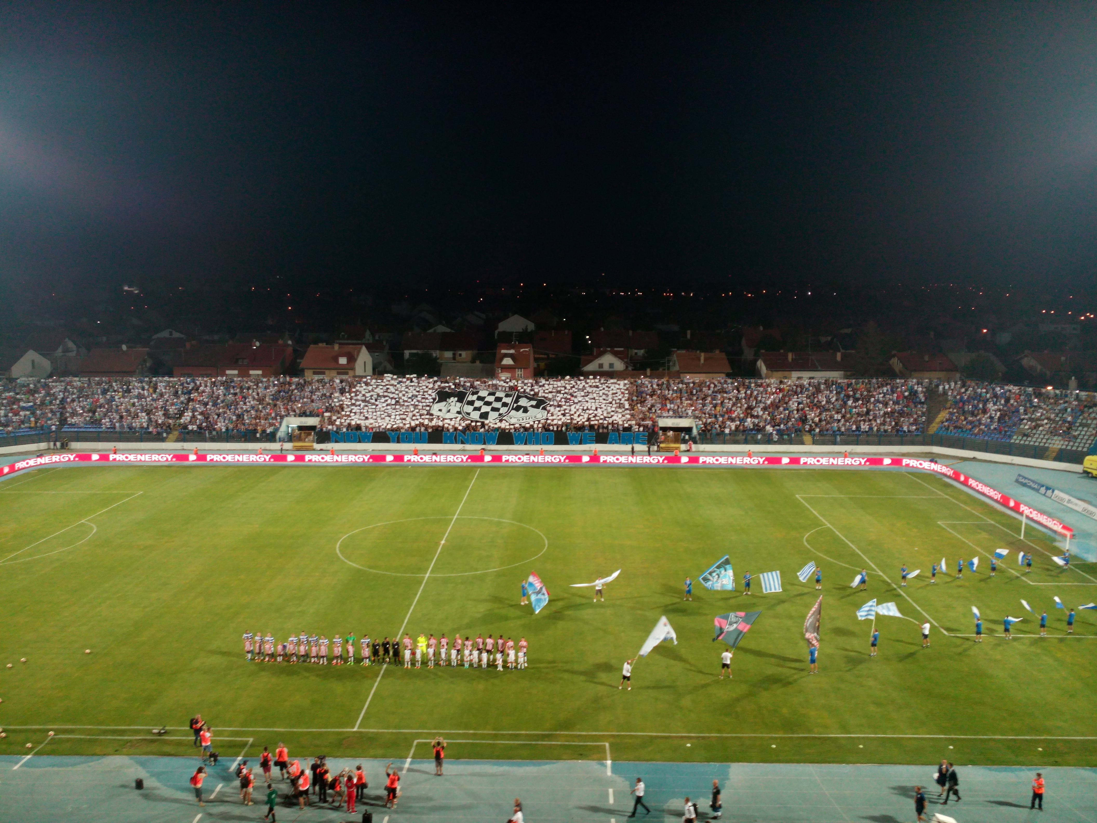 Koreografija Kohorte uoči utakmice između Osijeka i PSV-a.